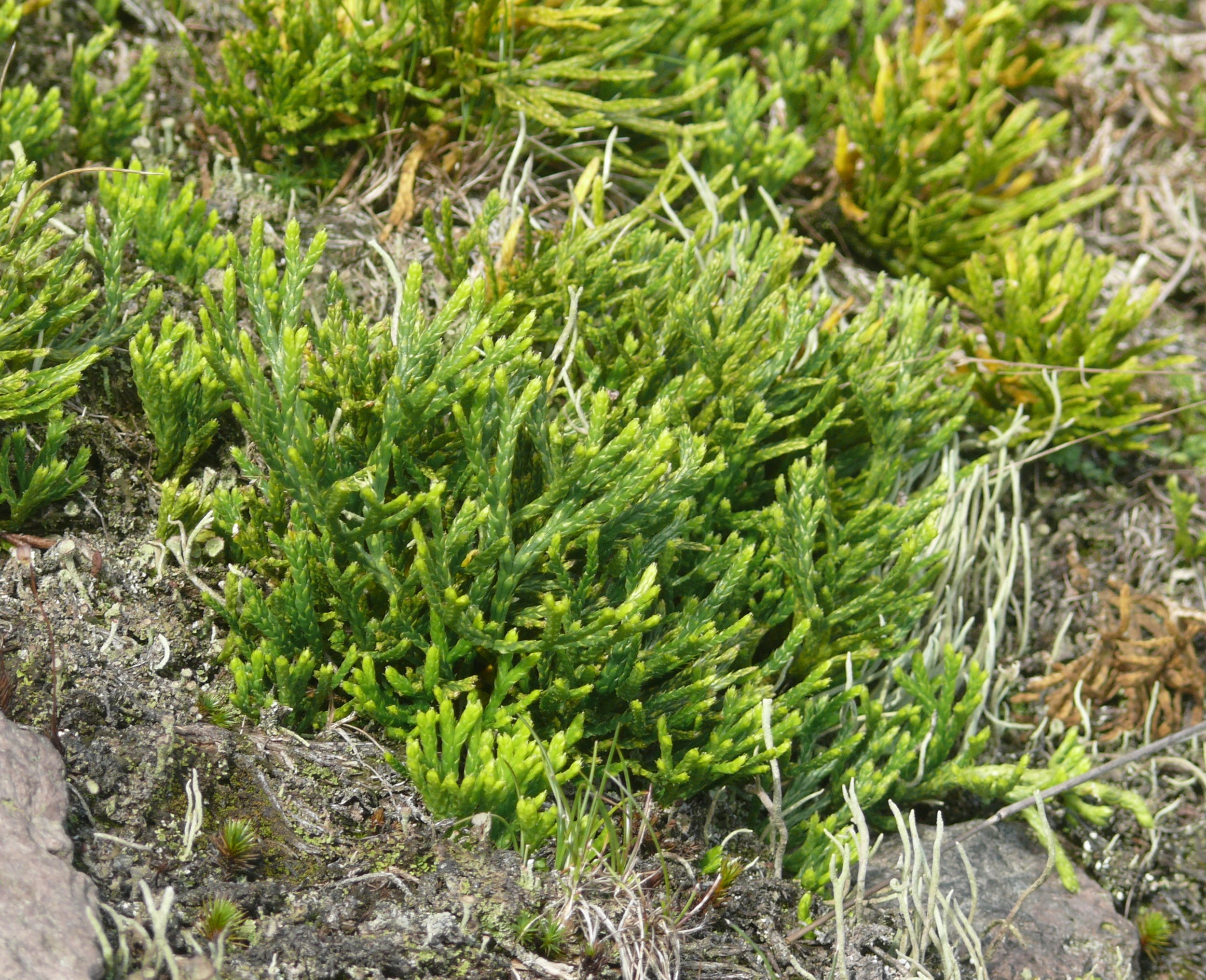 Diphasiastrum issleri, Thüringer Wald